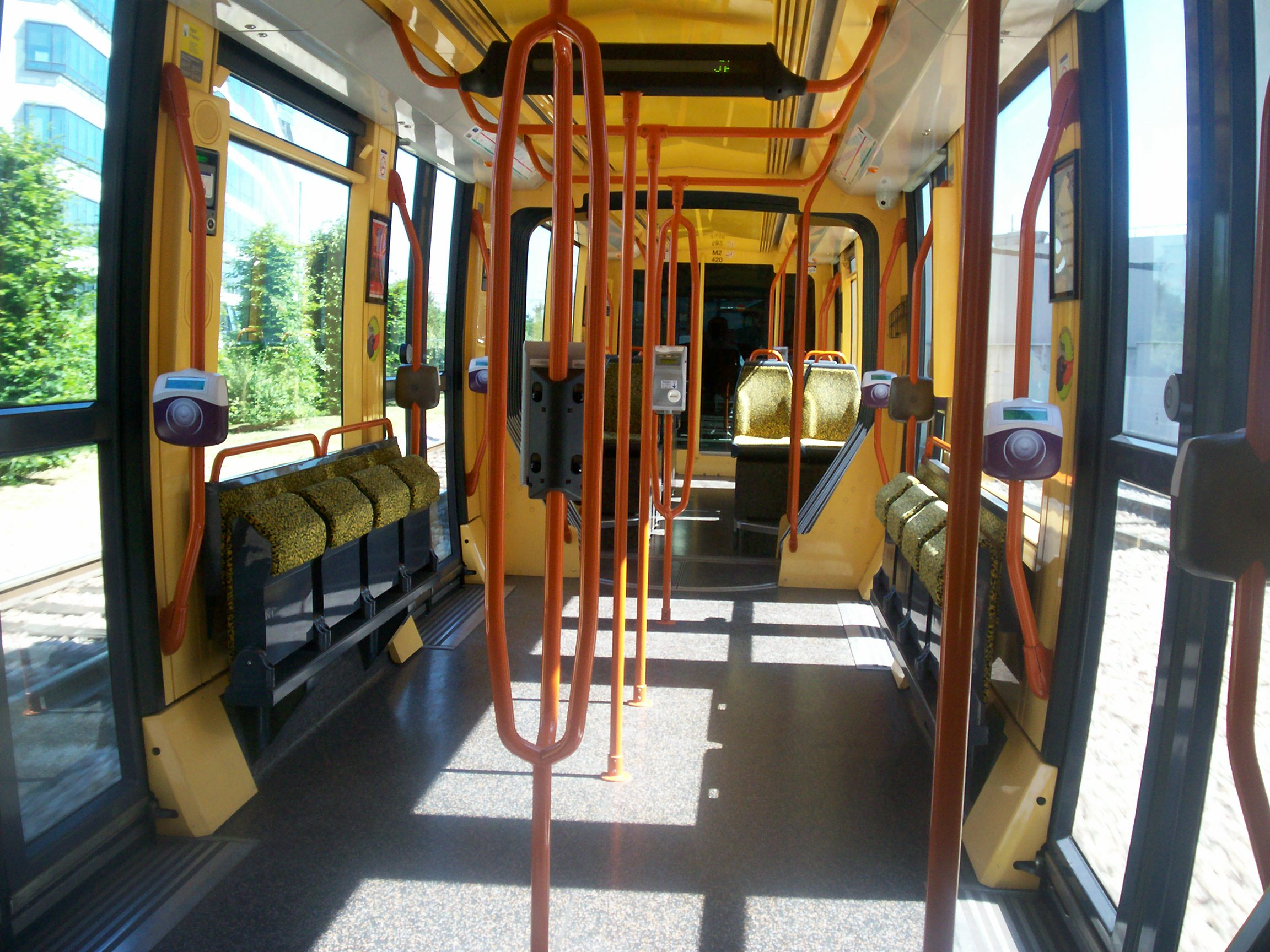 Intérieur d'un Citadis 302 du T2